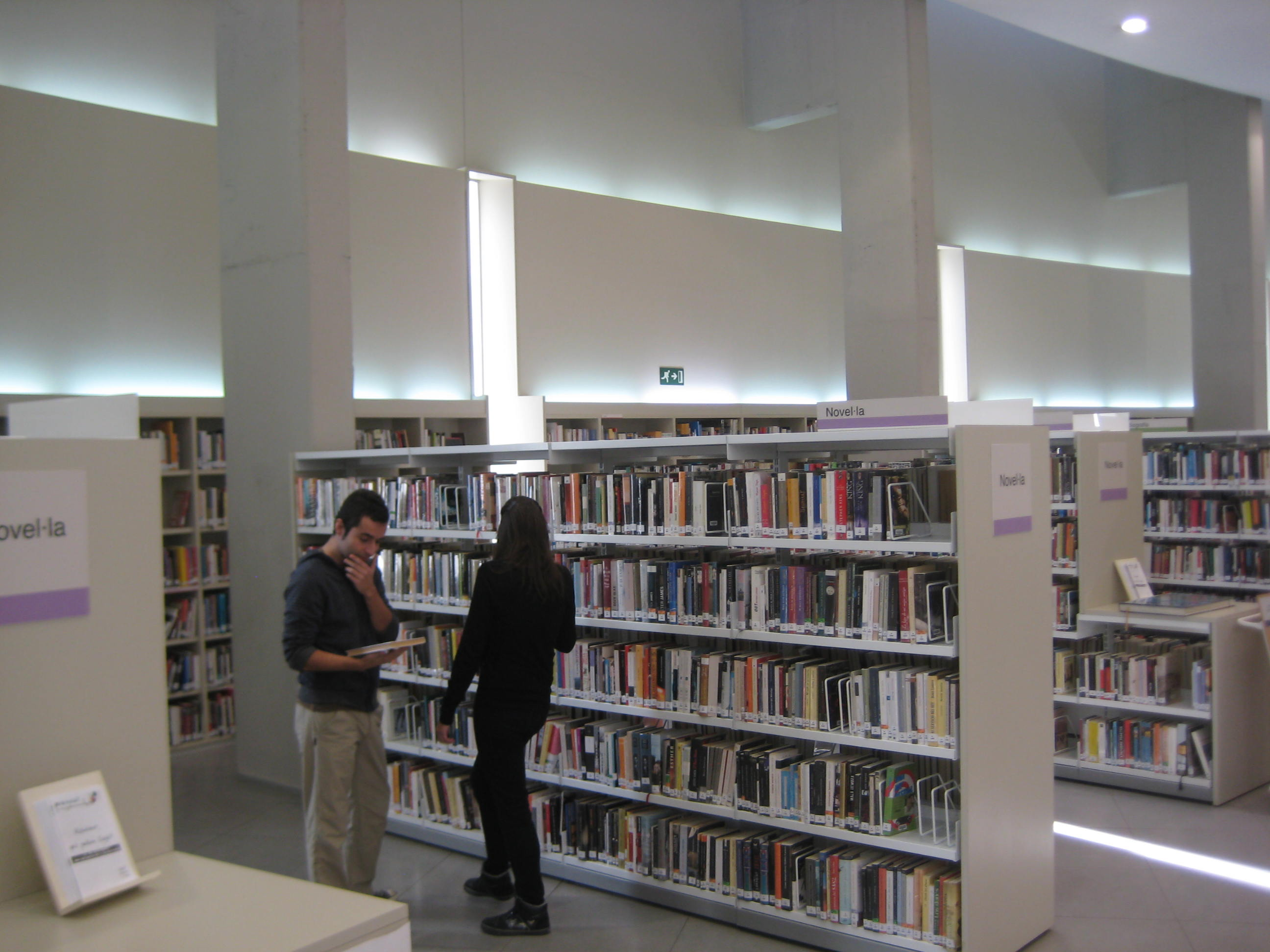 Zona de fons bibliogràfic a la sala d'adults de la Biblioteca Comarcal de Blanes.